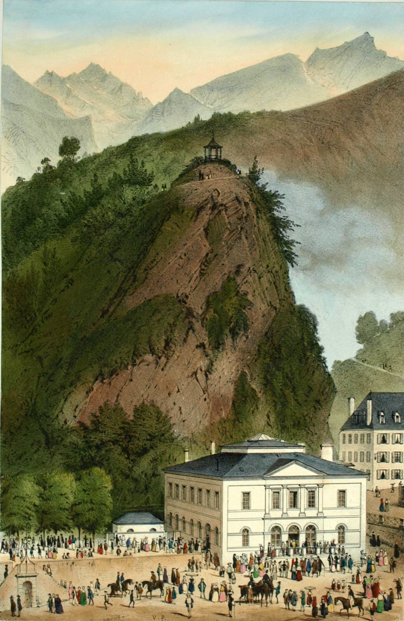 Thermes des Eaux-Bonnes - lithographie, avant 1830, France